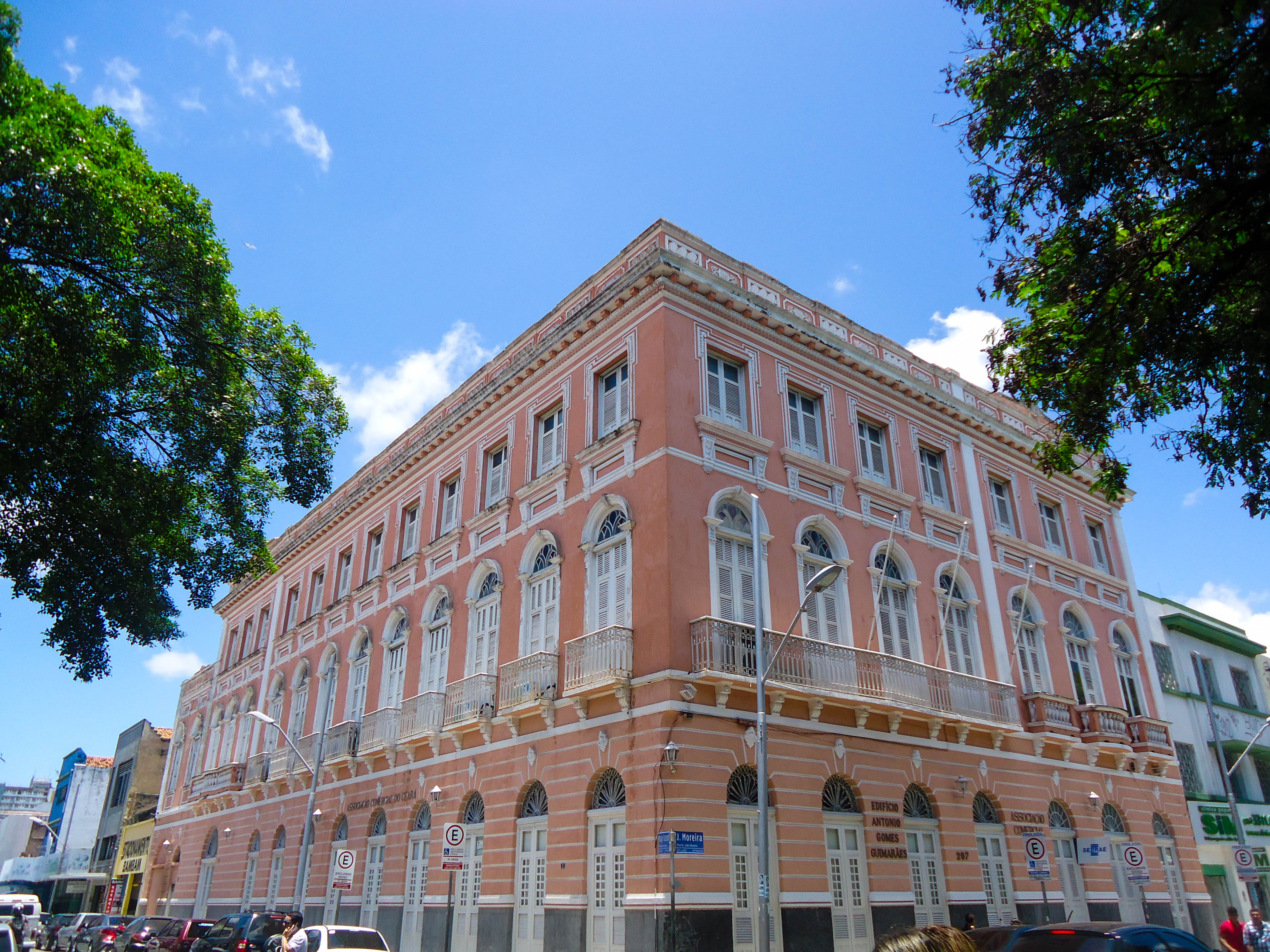 Associação Comercial do Ceará